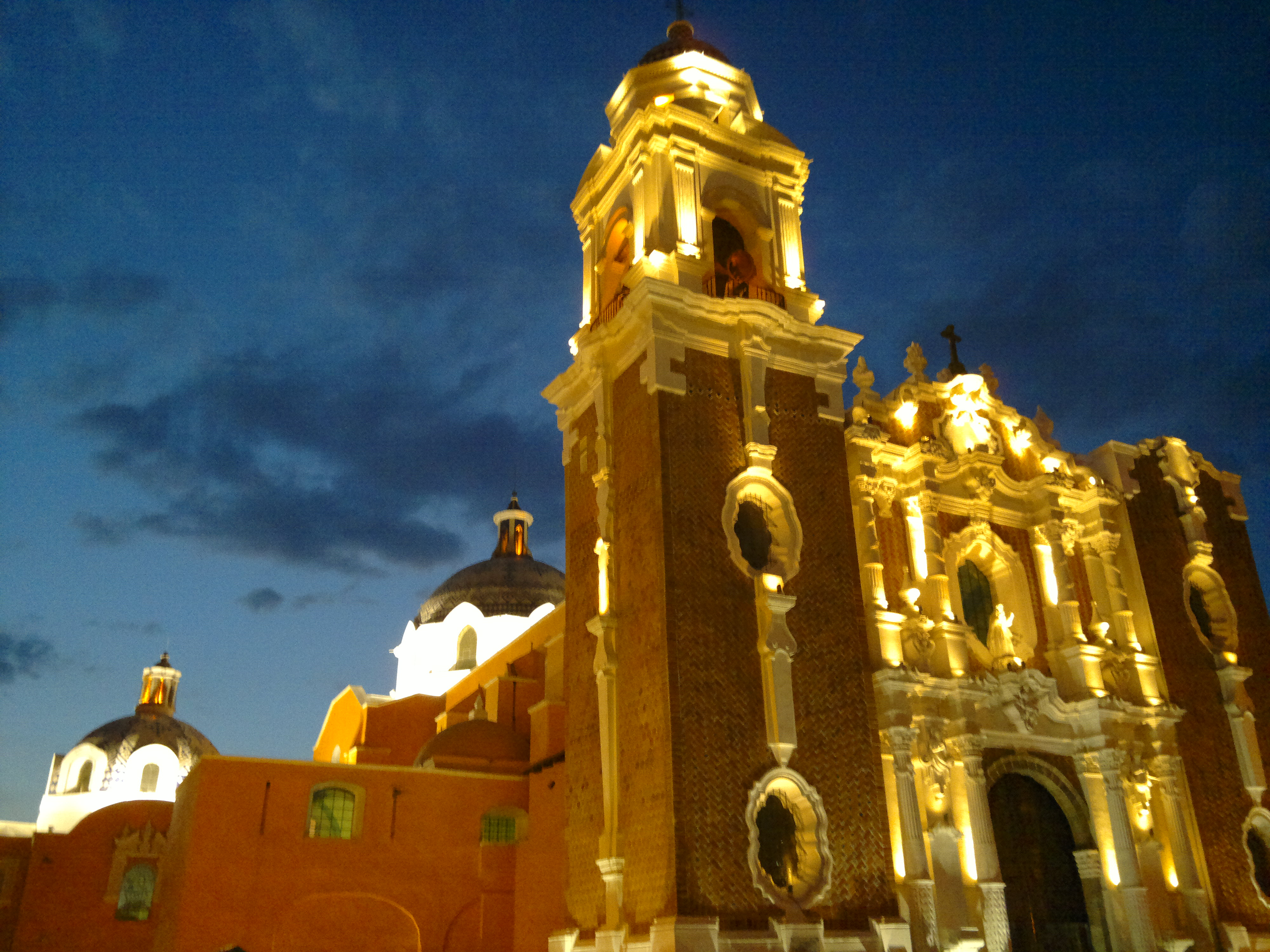 Centro, Tlaxcala de Xicohténcatl, Tlax., Mexico